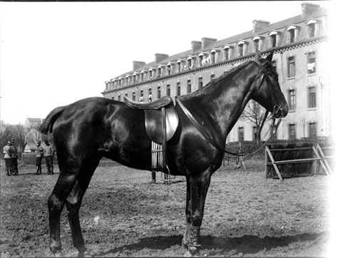 Fonds Trutat - Photographie ancienne Cote : TRU C 3360 Localisation : Fonds ancien (S 30) Original non communicable Titre : Cheval harnaché à la caserne Auteur : Trutat, Eugène Rôle de l’auteur : Photographe Date de création : 1859-1910 [entre] Mesures : : 6,5 x 9 cm Mot(s)-clé(s) : -- Extérieur -- Arsenal -- Cheval -- De profil -- Harnais -- Selle -- 19e siècle, 2e moitié -- 20e siècle, 1e quart Médium : Photographies -- Négatifs sur plaque de verre -- Noir et blanc -- Scènes animalières Bibliothèque de Toulouse. Domaine public